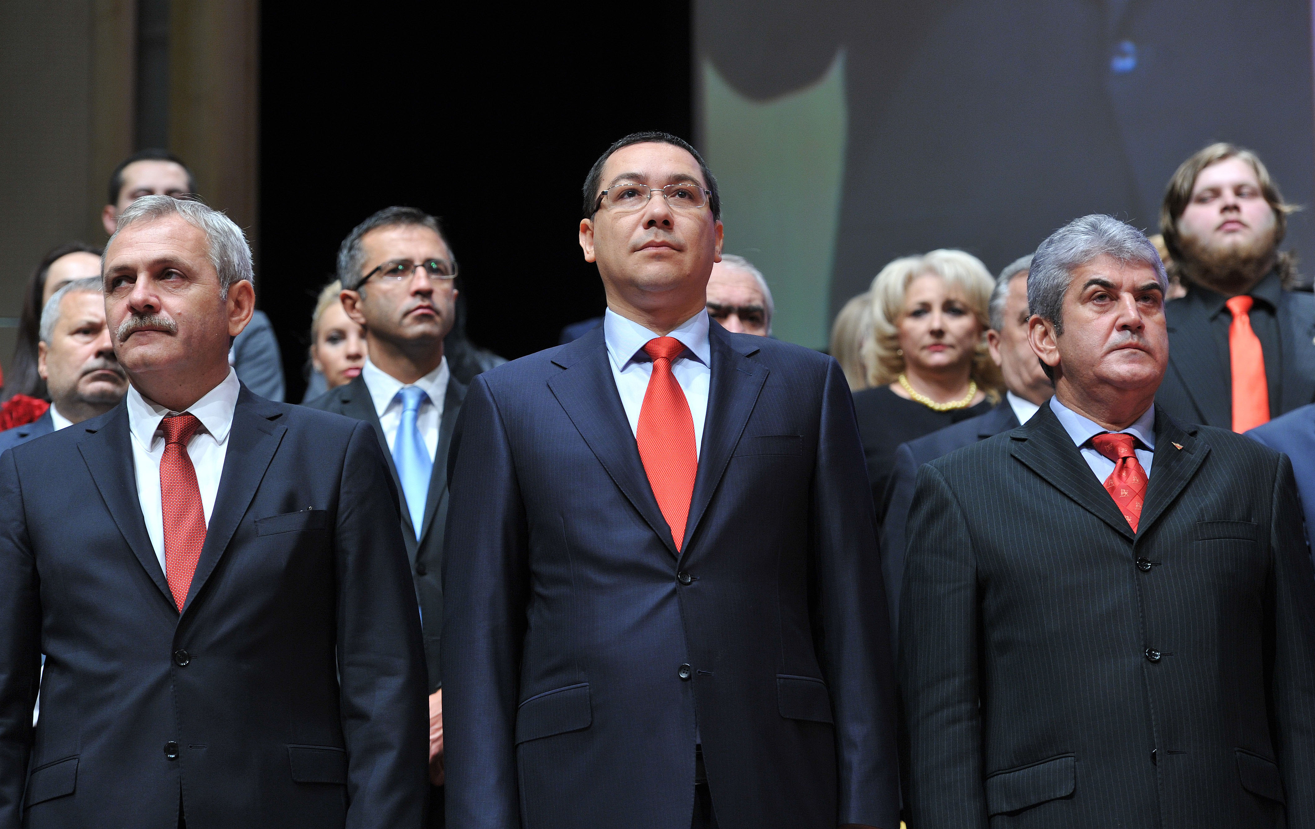 Liviu Dragnea si Victor Ponta la Consiliul National al PSD